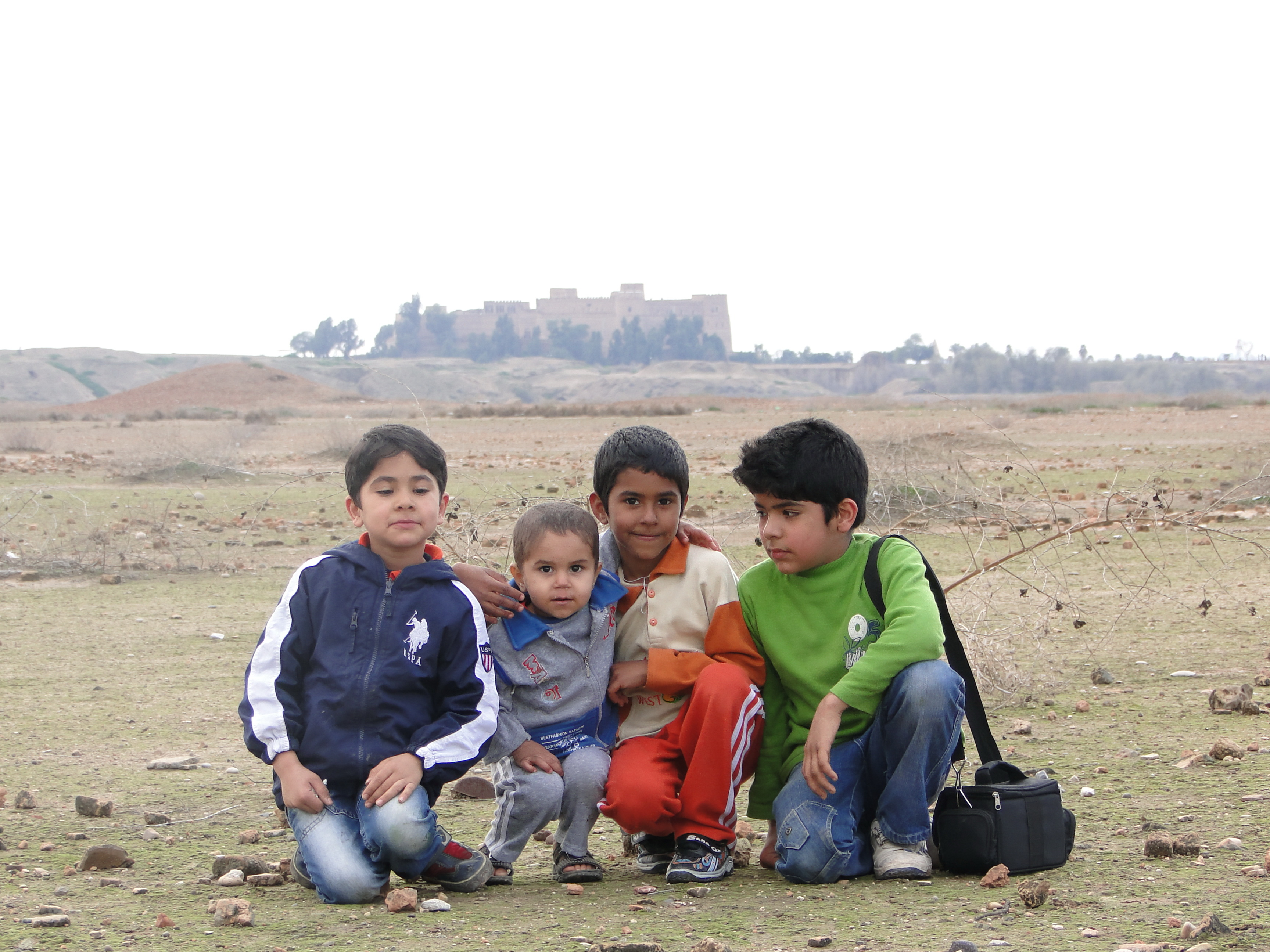 کودکان در شوش